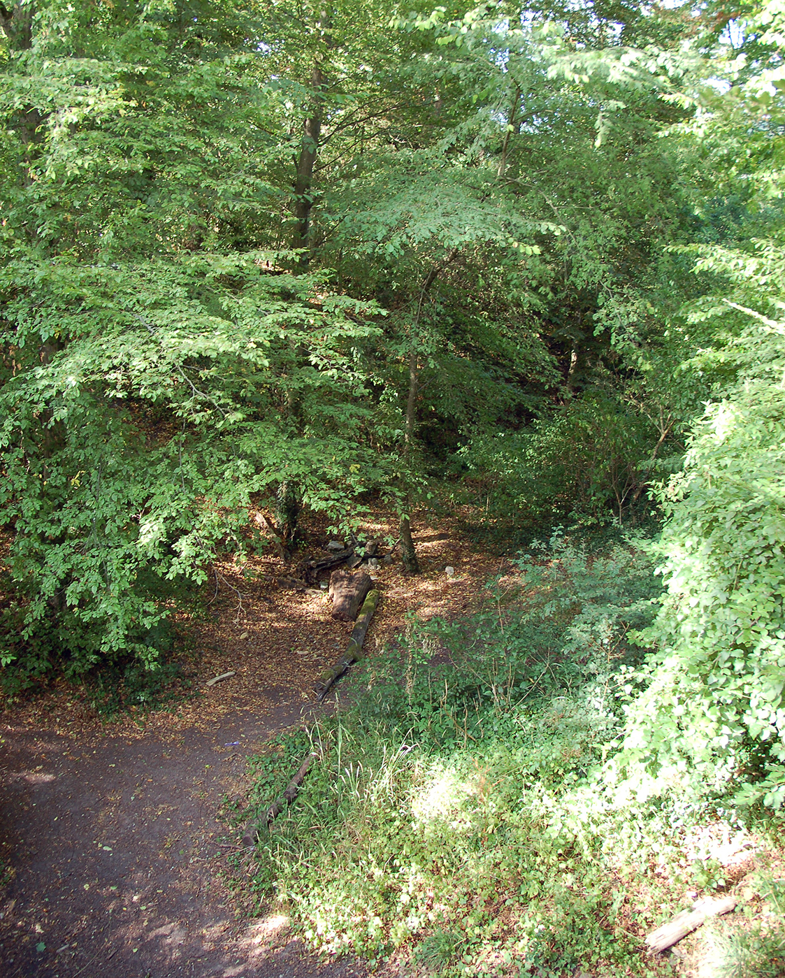 Breiter Halsgraben westlich des Burgstalls von Burg Eselsberg (von der Brücke aus)